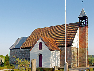 Læsten Kirke Purhus Kommune; Sønderlyng Herred, Viborg Amt, Denmark.